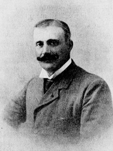 "Comte Robert de Roquefeuil, fondateur (1886) et 1er président de l'Association catholique de la Jeunesse française".